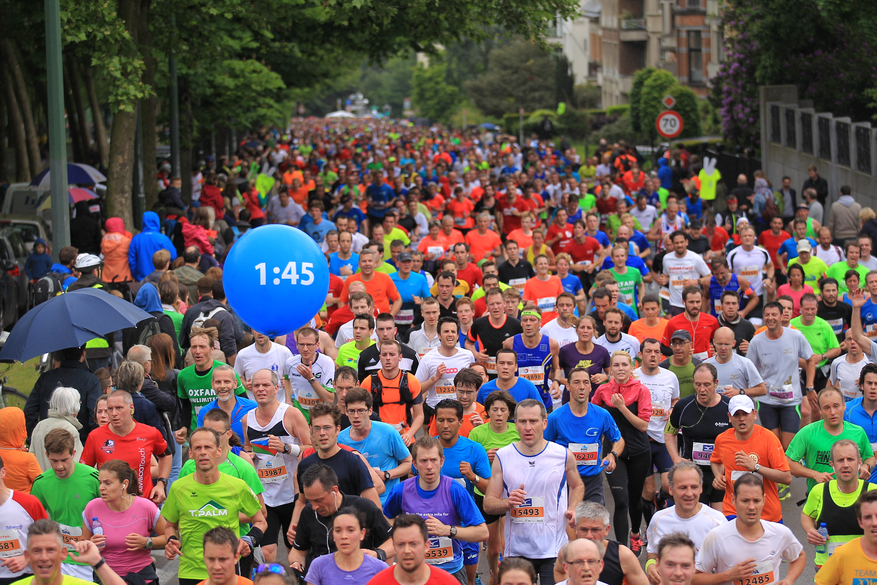 Avenue de Tervueren